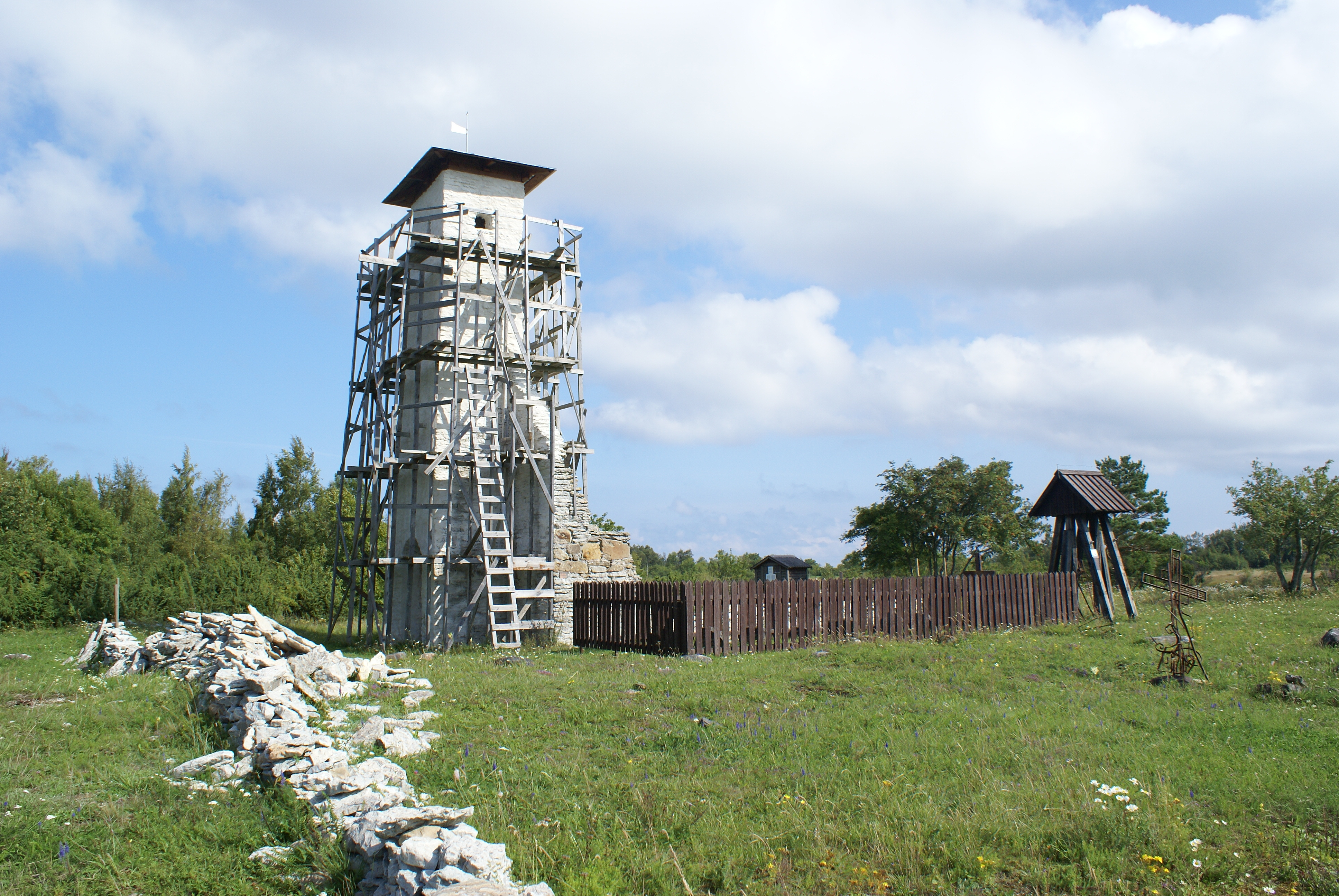 Osmussaare hävitatud kiriku taastatav kellatorn ja mälestuskalmistu.